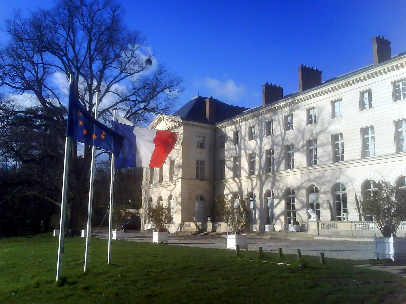 Château de Grouchy, façade